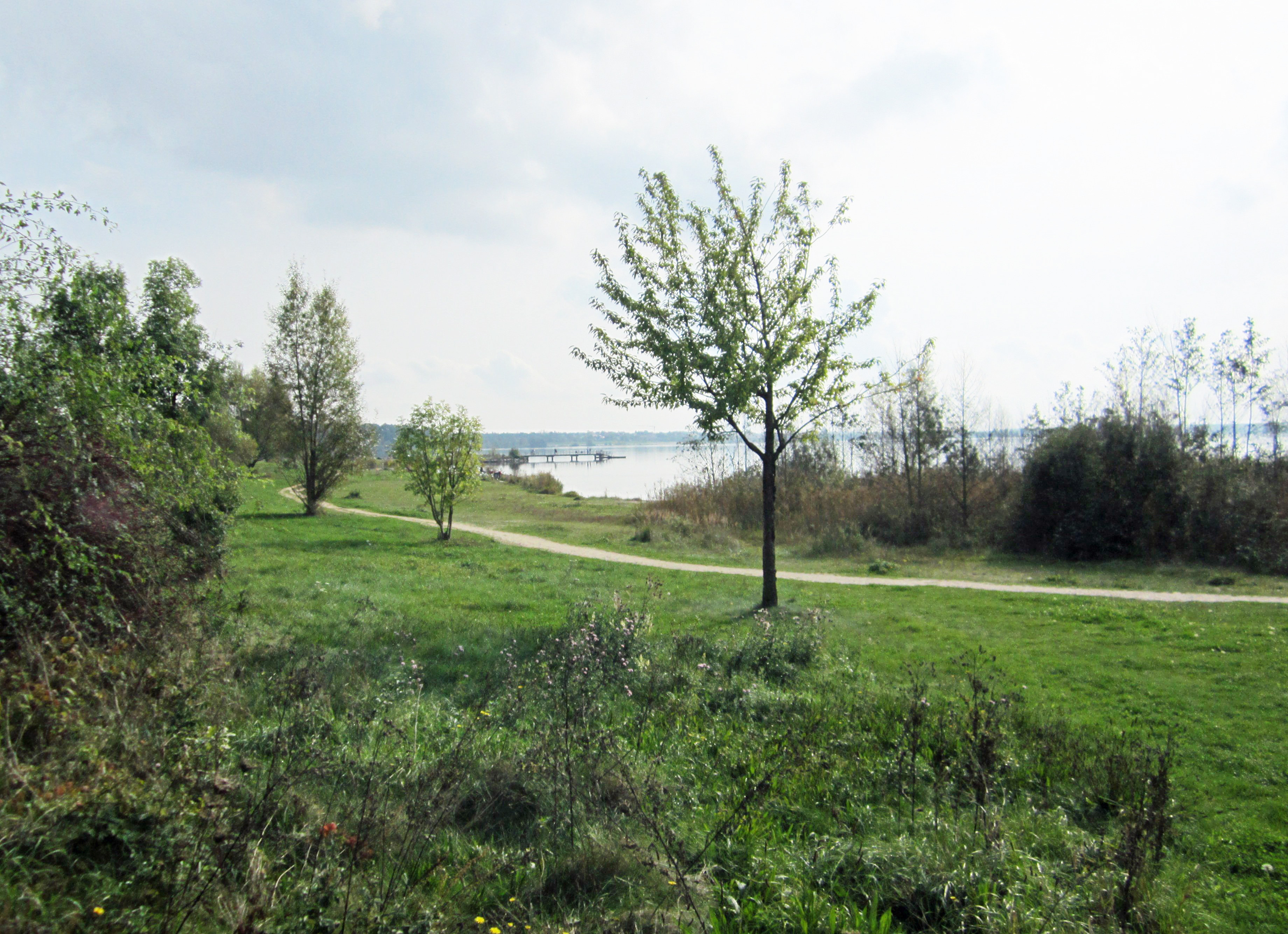 Nordwestufer des Cospudener Sees, Blick Richtung Markkleeberg. LSG Leipziger Auwald.